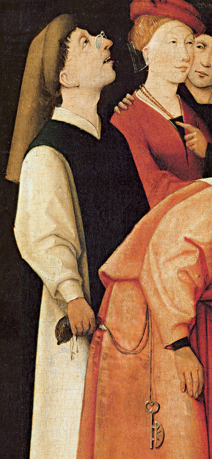 Détail de L'Escamoteur de Jérôme Bosch